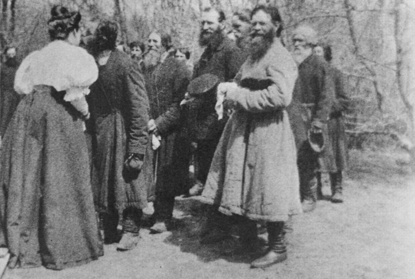 Русский фотограф: крестьяне приветствуют свою помещицу в пасхальный день